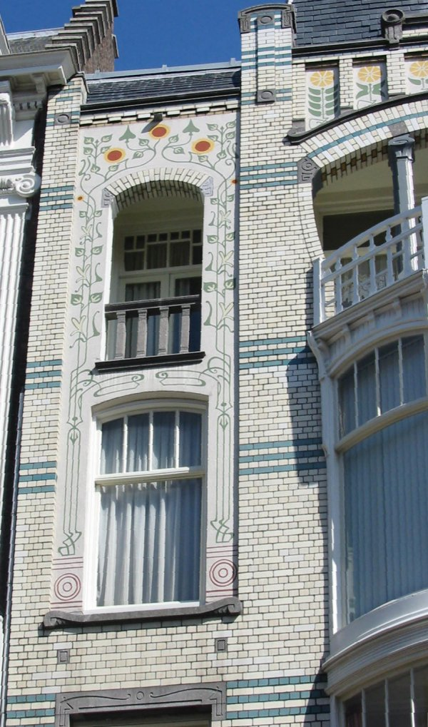 Jugendstil versieringen in Den Haag, april 2004, eigen foto van Gebruiker:Ellywa, ter beschikking gesteld onder de GNU/FDL licentie. Het is een winkel/woonhuis Kettingstraat 29/31, uit 1903, "de Goede Bron", naar een ontwerp van J.W. Bosboom.